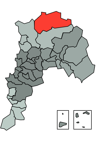 Comuna Petorca